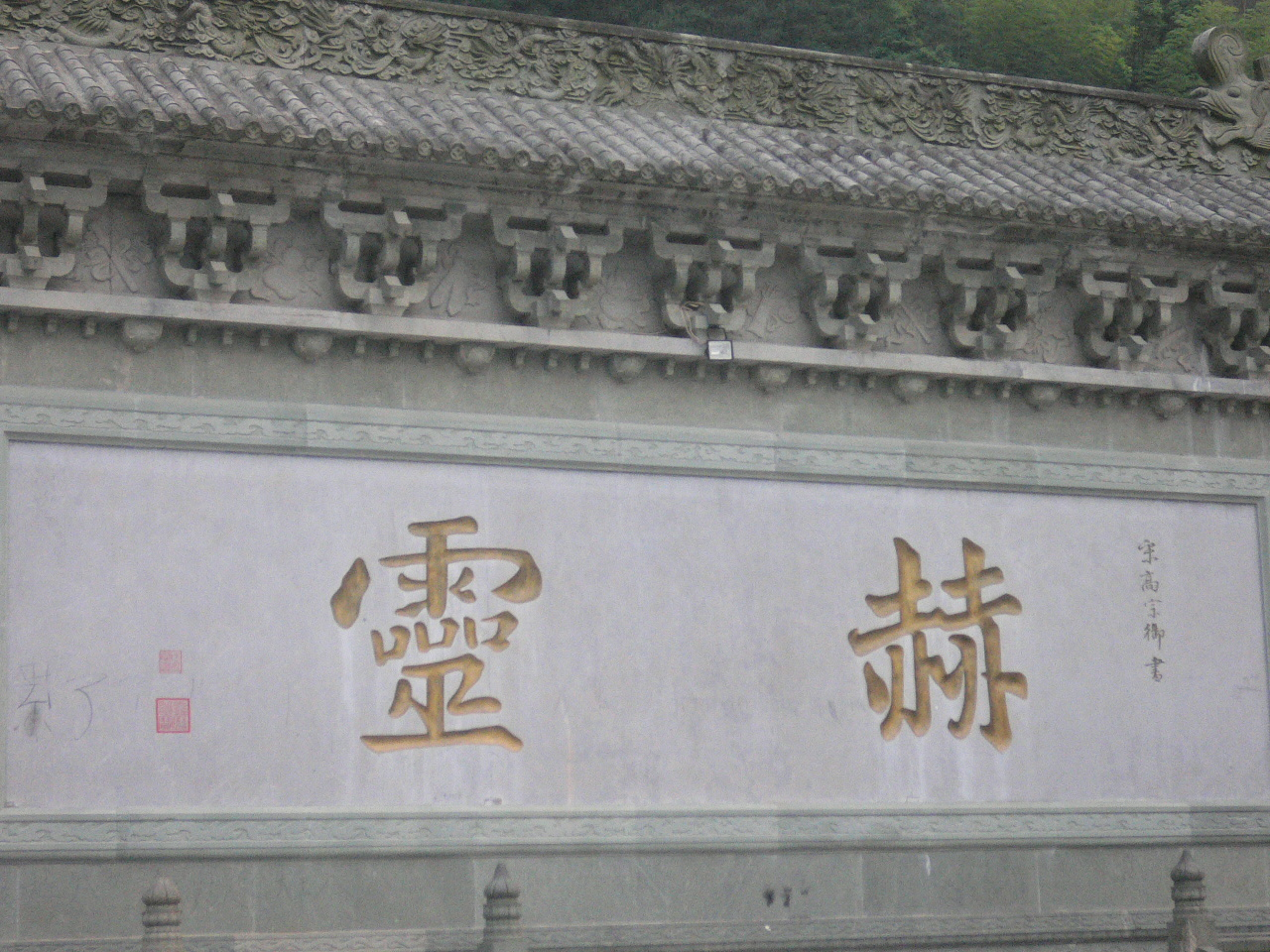 浙江方岩，宋高宗赐胡则“赫灵”庙额